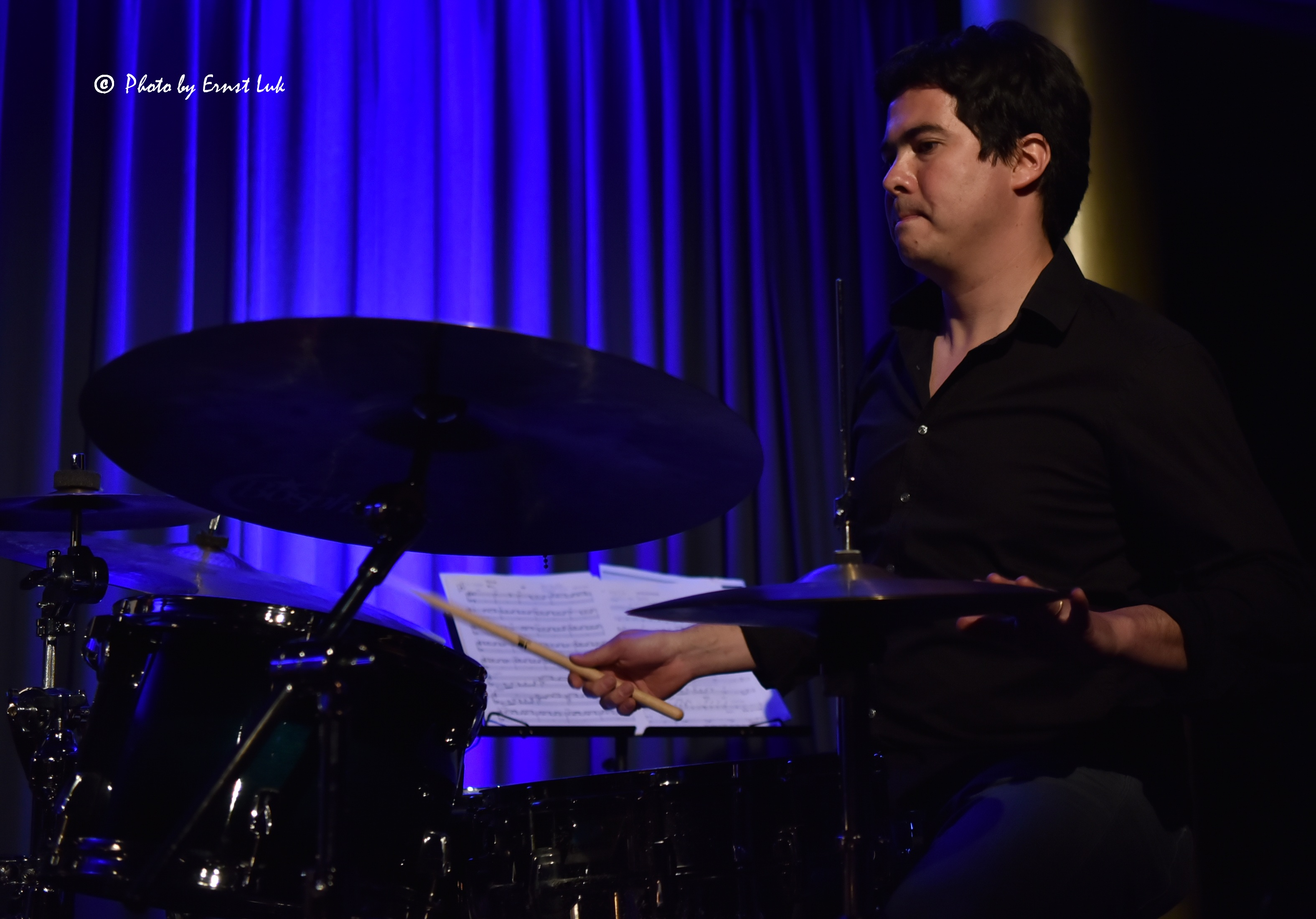 24.05.2017 Trio Molino - Säule Jazz Duisburg